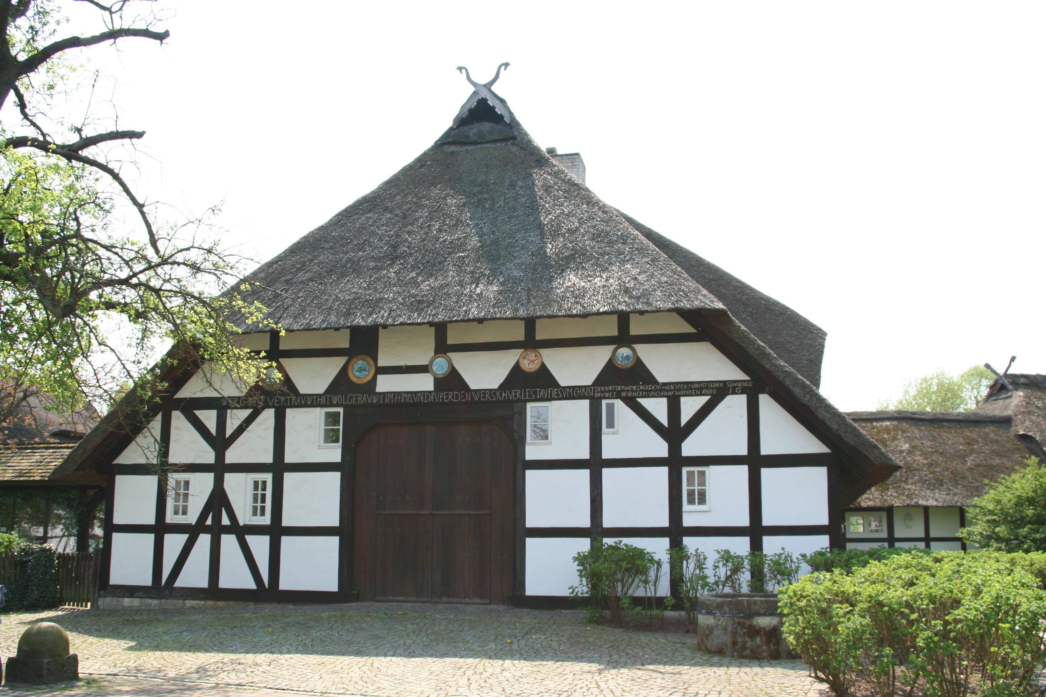 Das Parsauhaus. Fachwerksiedlung Riddagshausen, Braunschweig.